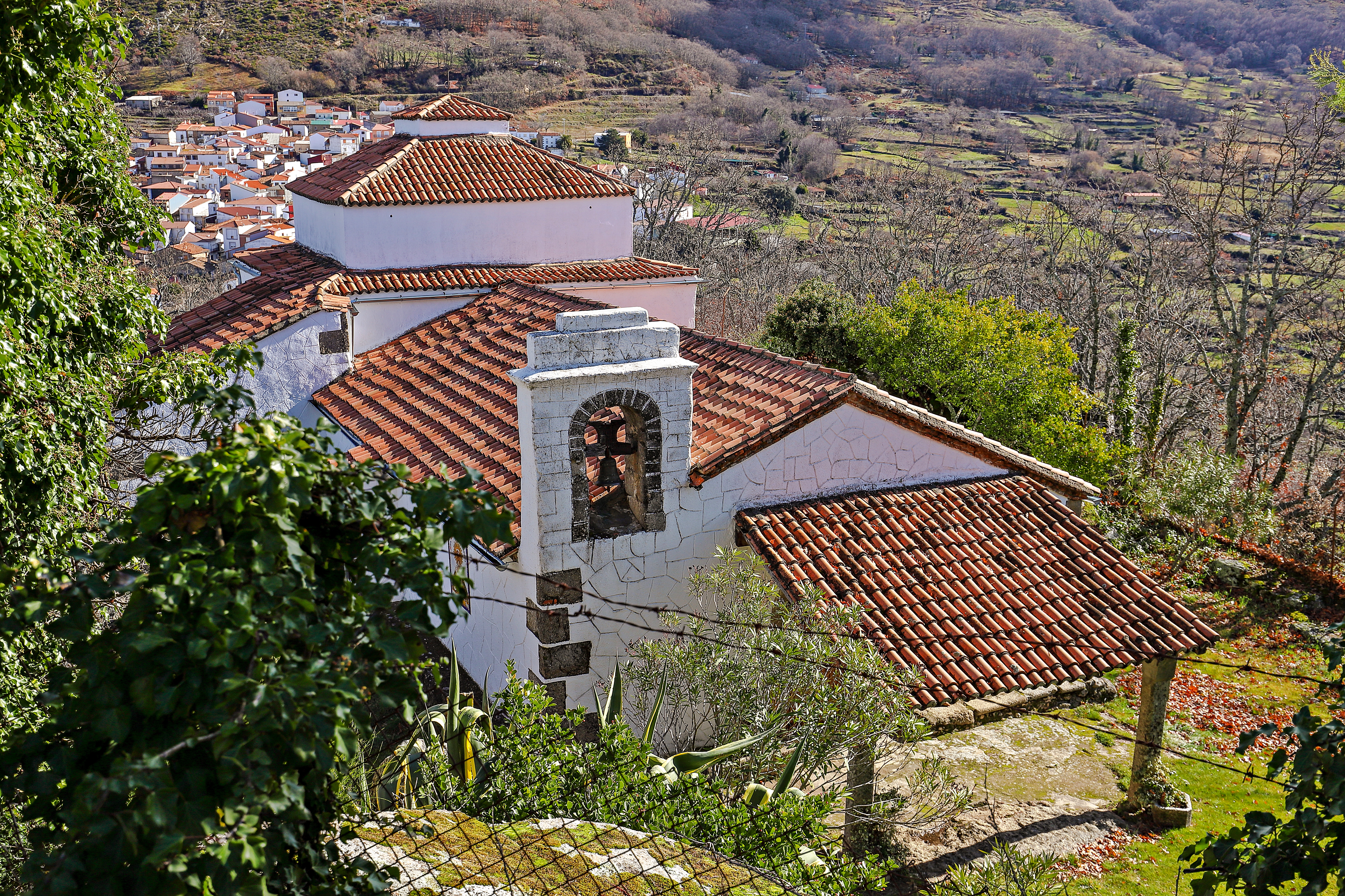 Cabezabellosa es un municipio de la comarca de Trasierra en la provincia de Cáceres.